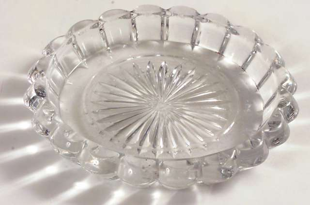 Flaskebrikke av pressglass, antakelig fra begynnelsen av 1900-tallet. Diameter 11,8 cm. Foto Anne-Lise Reinsfelt/Norsk Folkemuseum. NF.1947-0487AB.